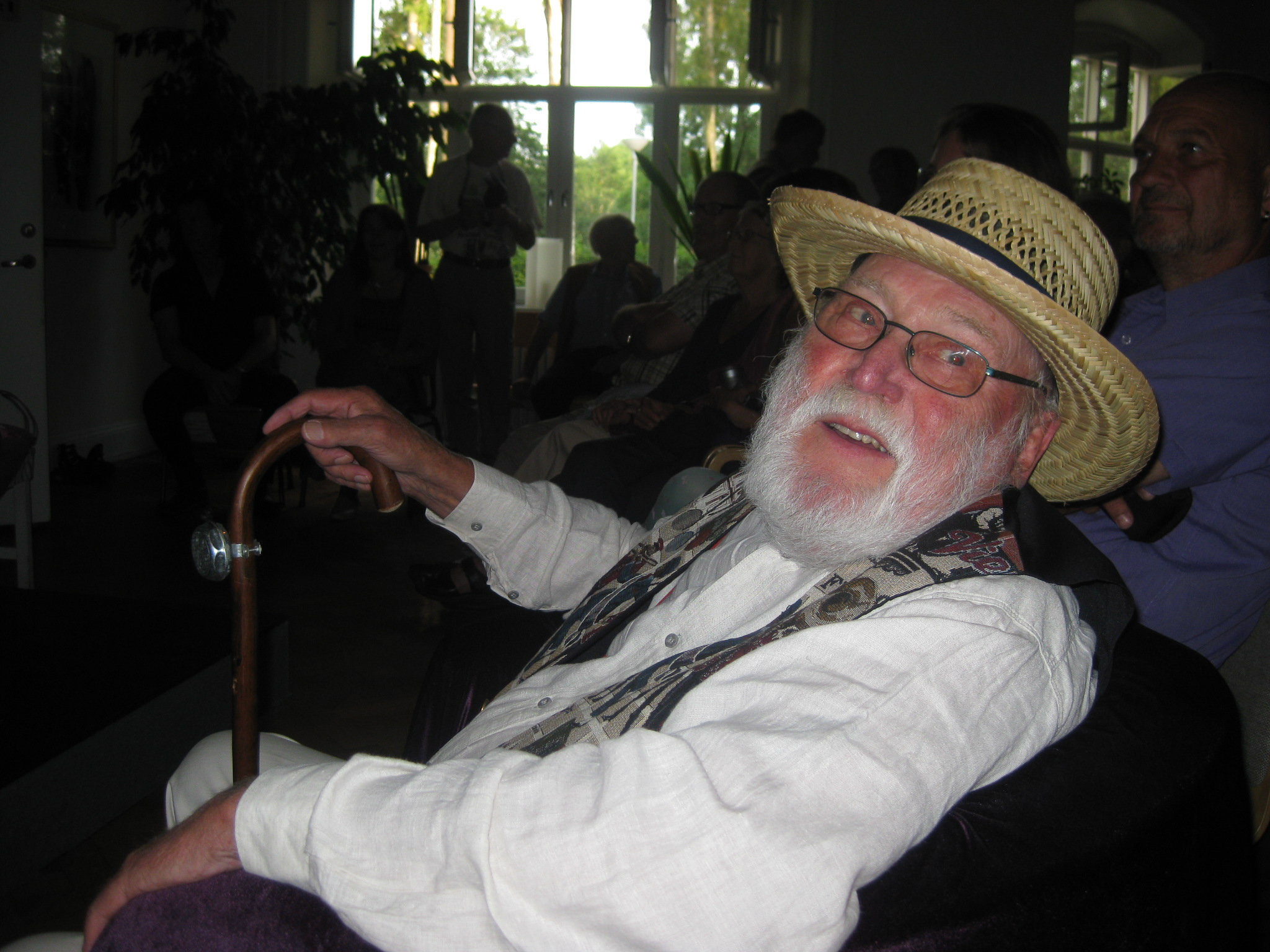 Hasse Gille firar sin 80-årsdag på Eric Sahlströminstitutet med folkmusik och tradjazz.